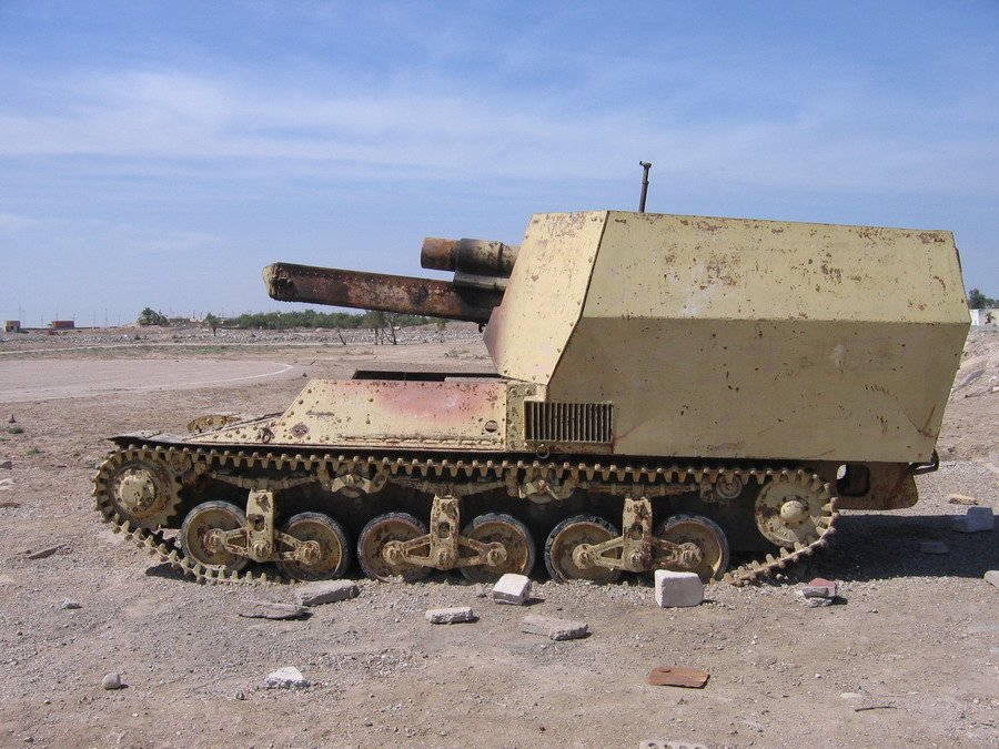 15 cm sFH.13/1/ (Sf) auf Geschutzwagen Lorraine prise en 2003 en Irak a Bassorah.